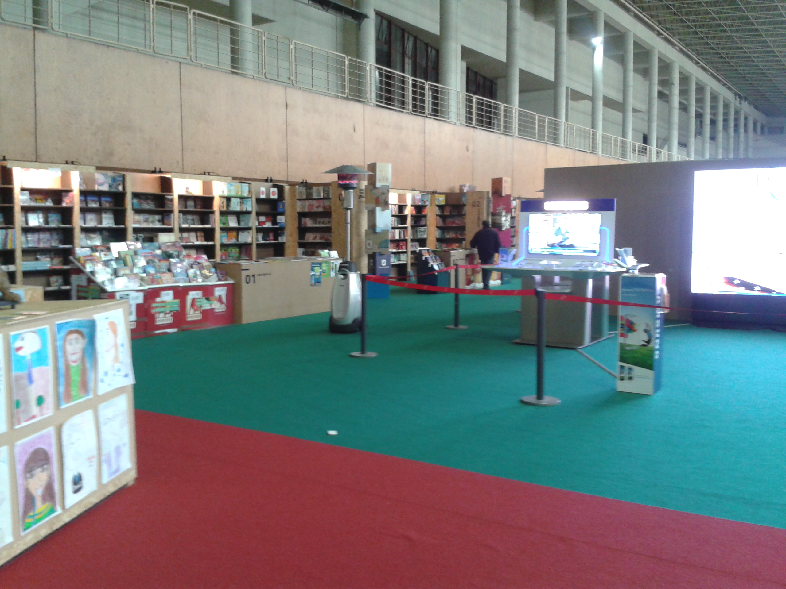 Feira do Livro de Braga de 2013